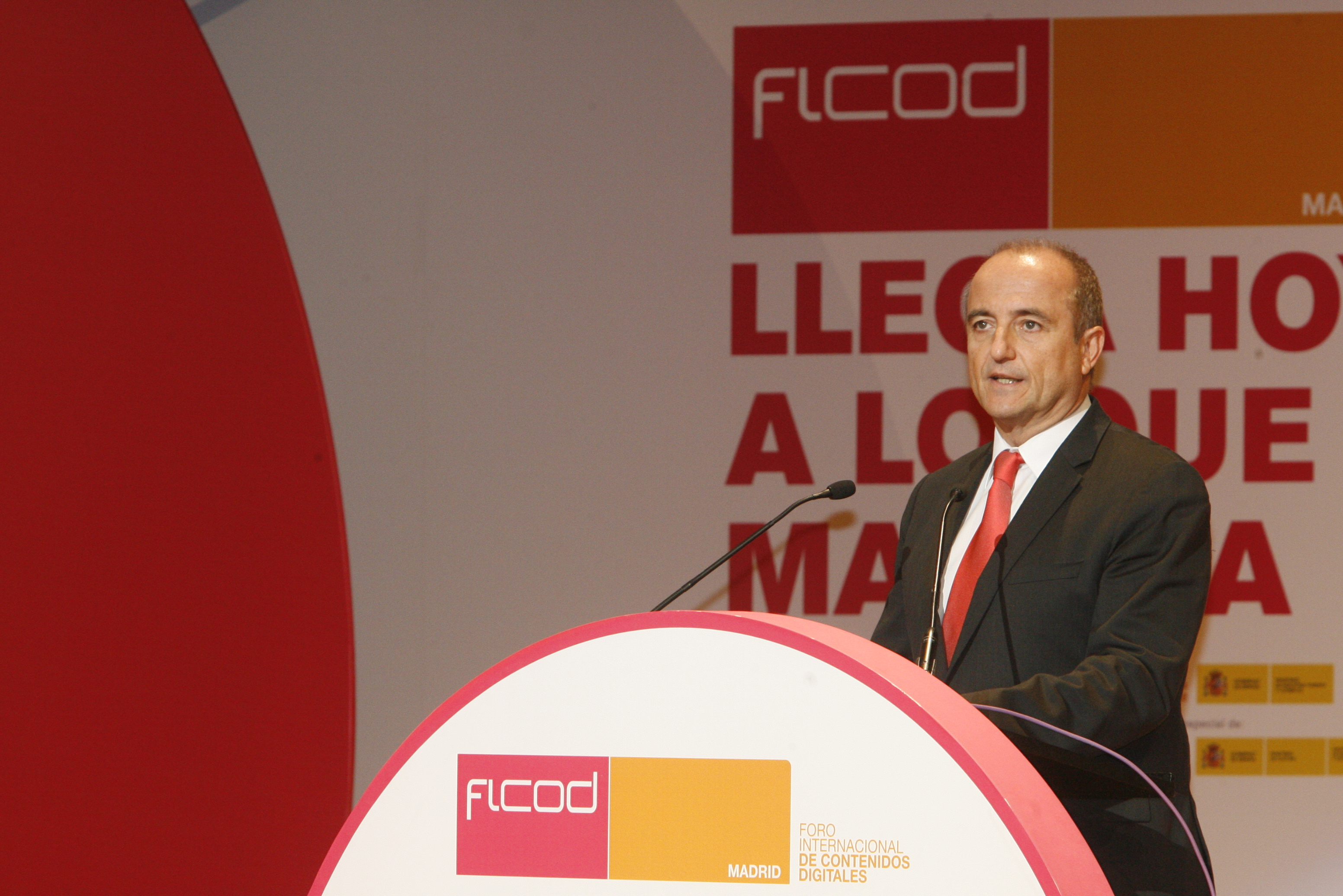 El Ministro Miguel Sebastián fue uno de los encargados de dar el pistoletazo de salida a FICOD 2010, demostrando el compromiso que su Ministerio tiene con la industria de los contenidos digitales